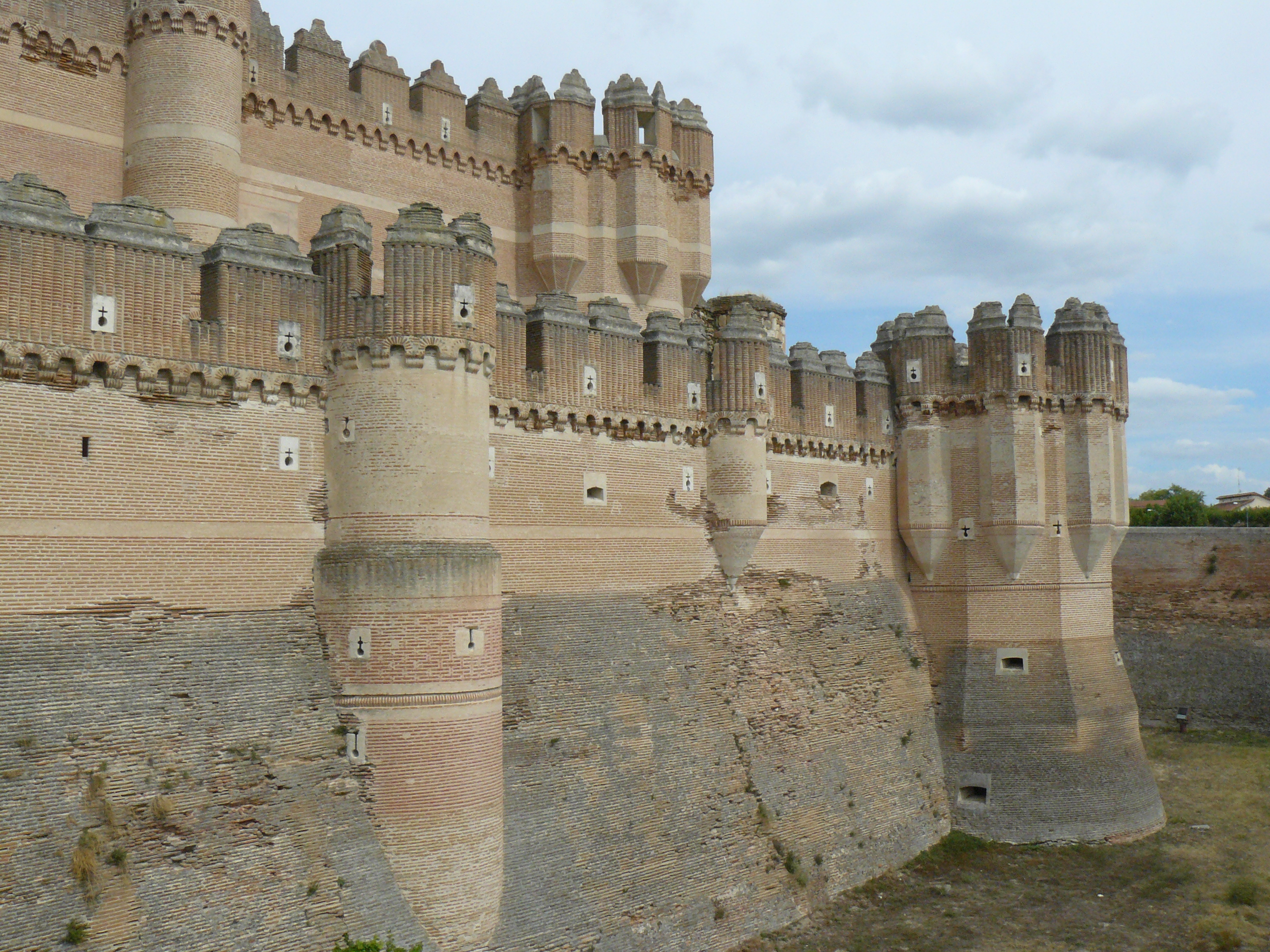 Castillo de Coca, Segovia.